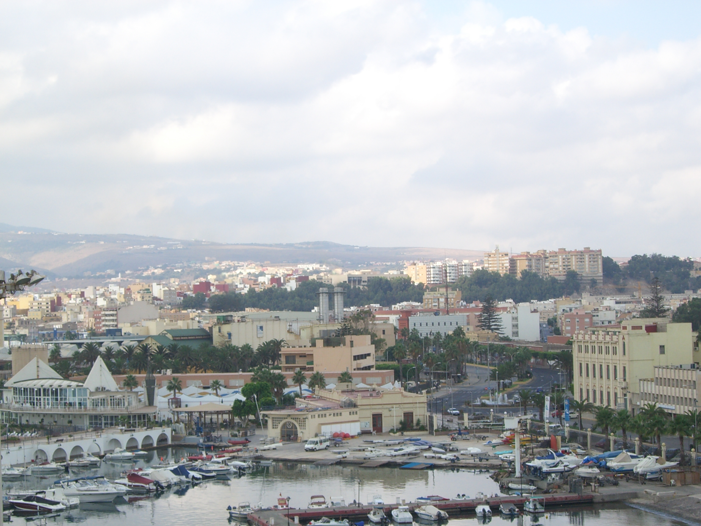 Dársena Pesquera y Real Club Marítimo, Melilla